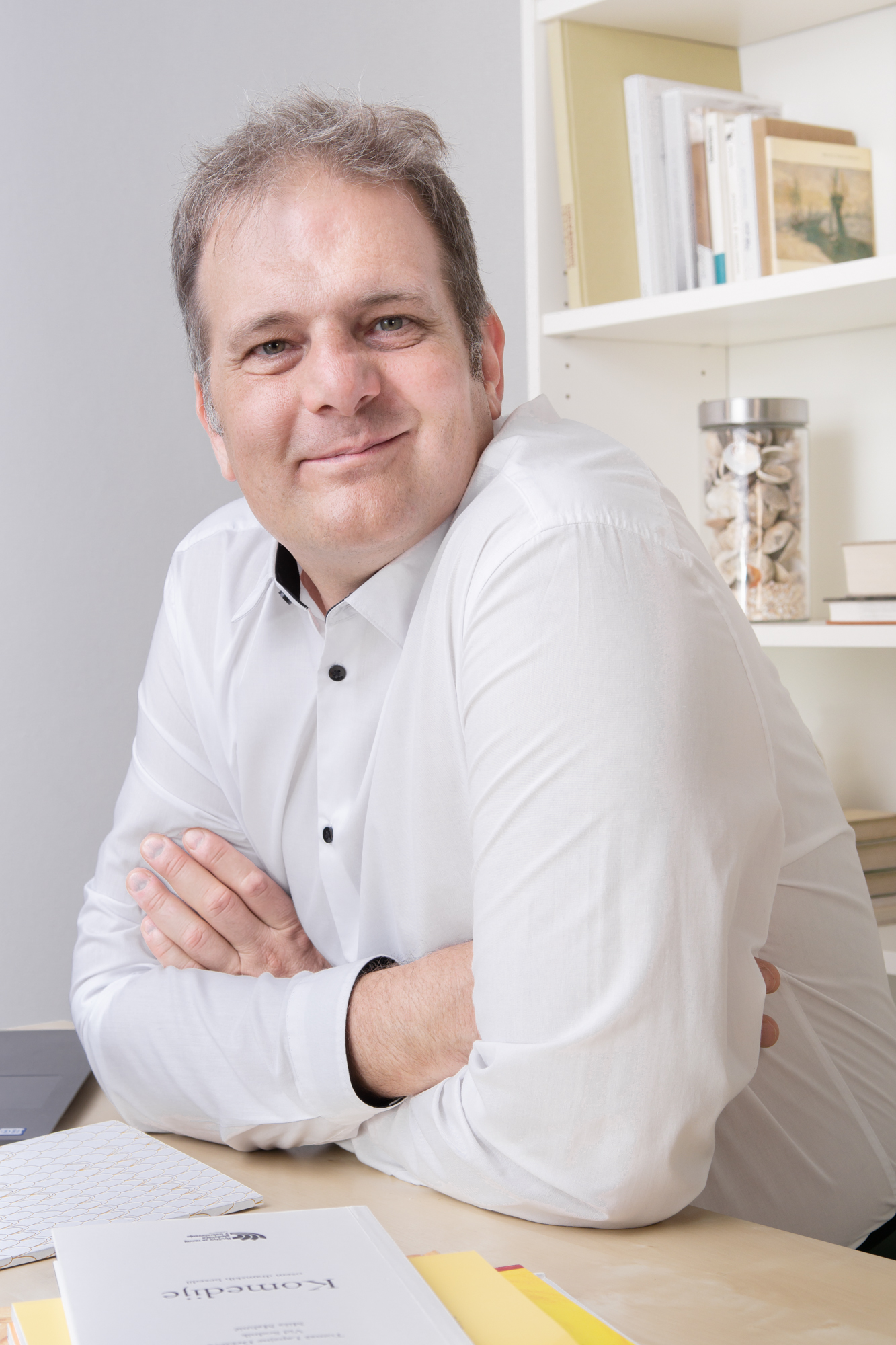 Tomaž Lapajne Dekleva